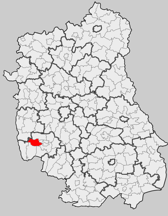 Map of gmina Dzierzkowice, Kraśnik county, Lublin voivodship Mapa gminy Dzierzkowice, powiat kraśnicki, województwo lubelskie